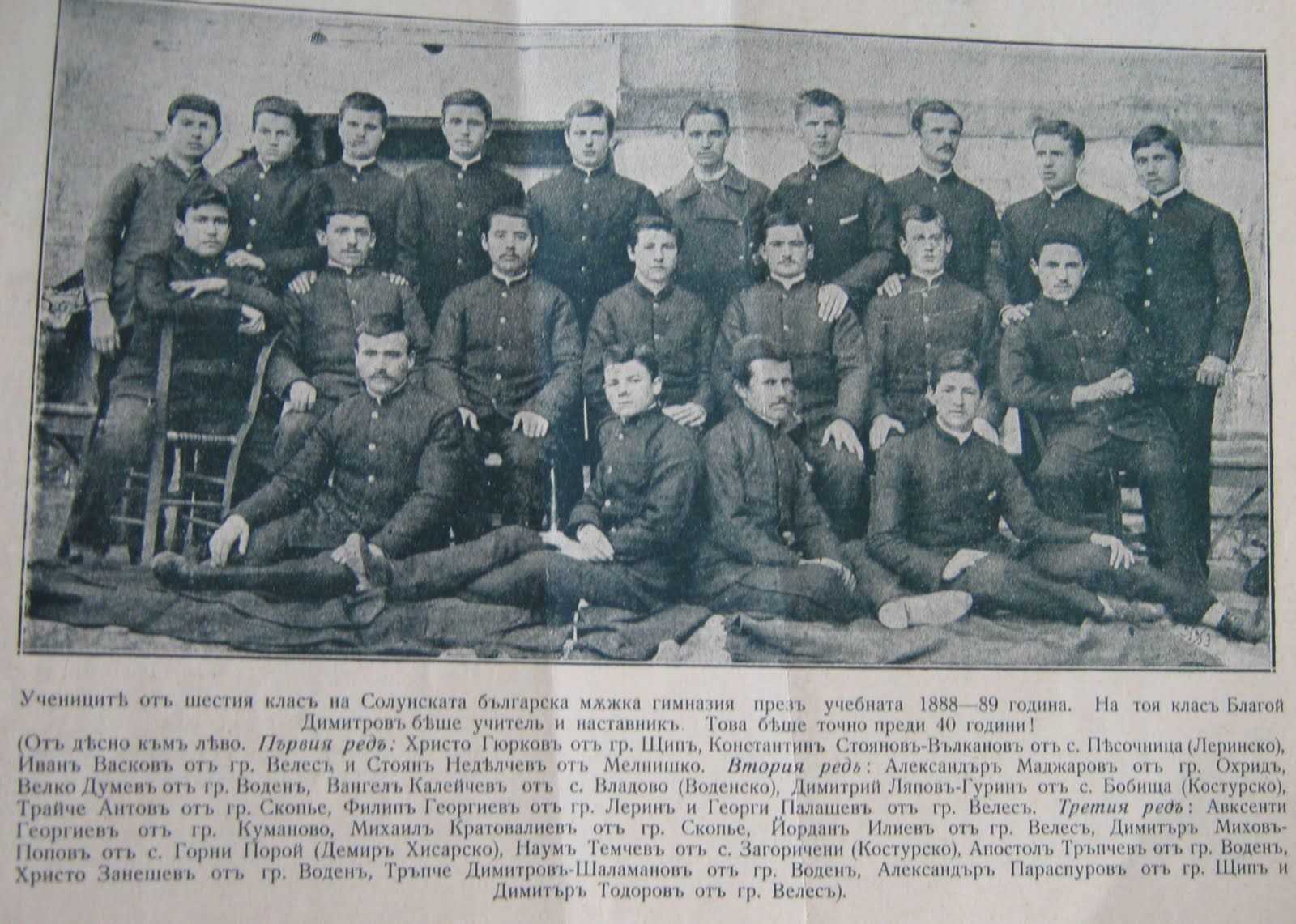 Ученици в Солунската българска гимназия 1888 - 1889 г.